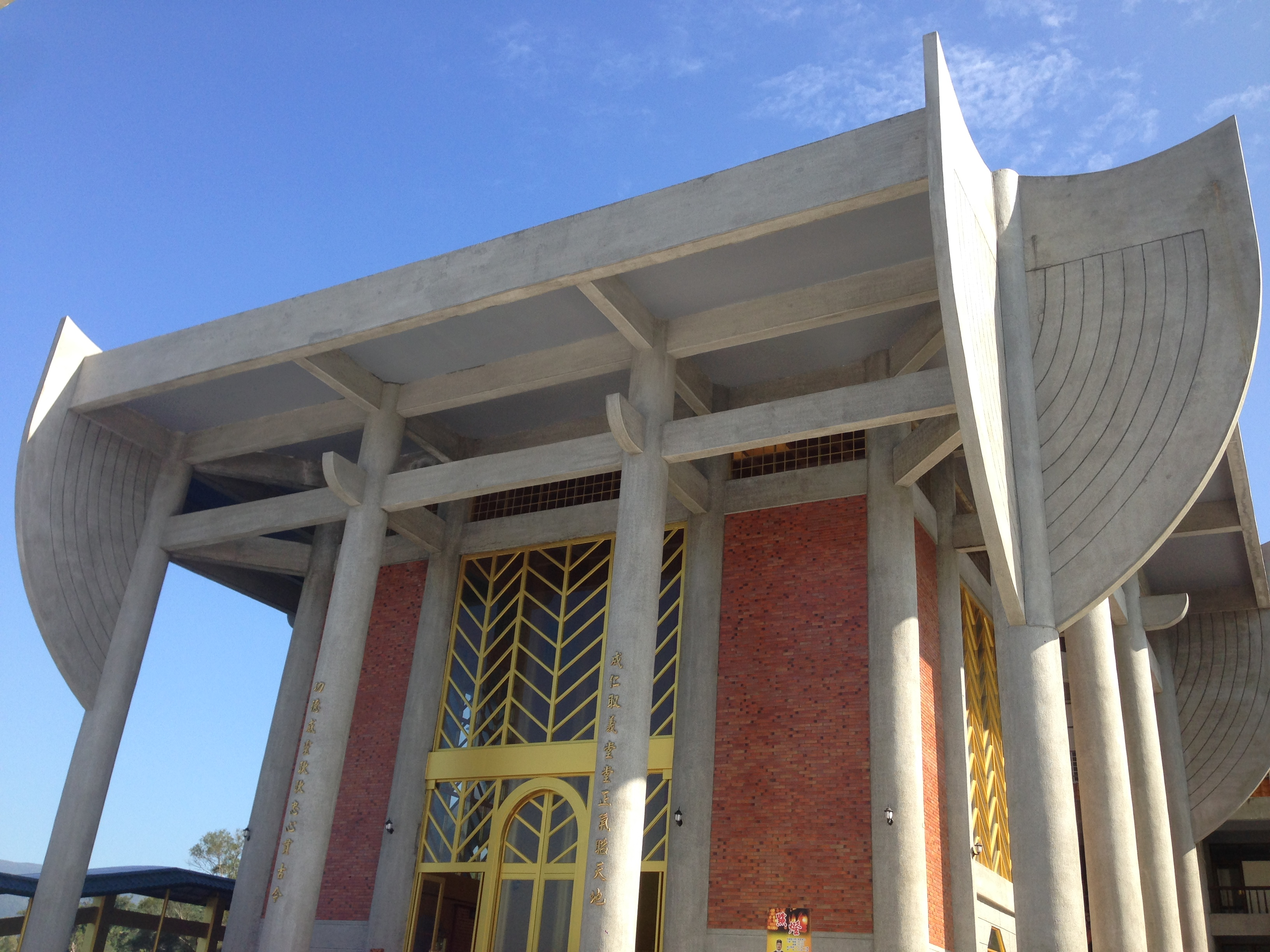 開臺聖王成功廟主殿